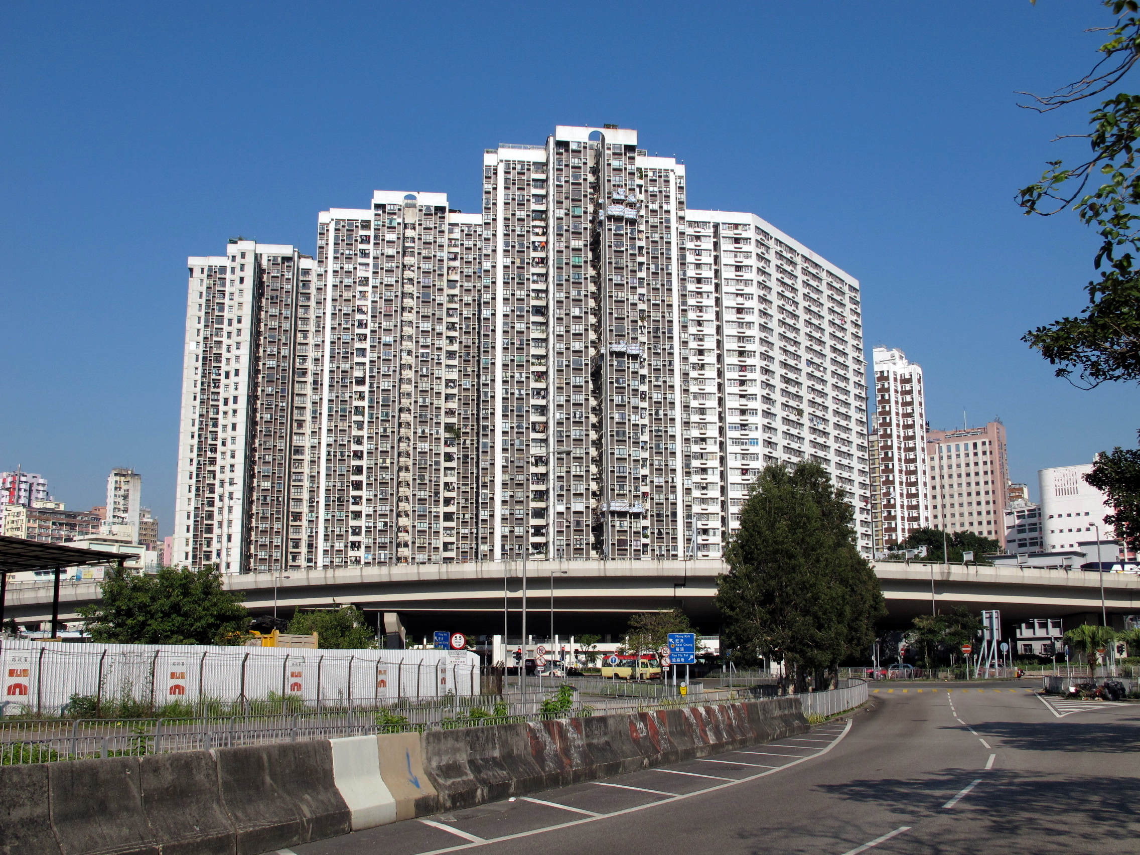 Prosperous Garden